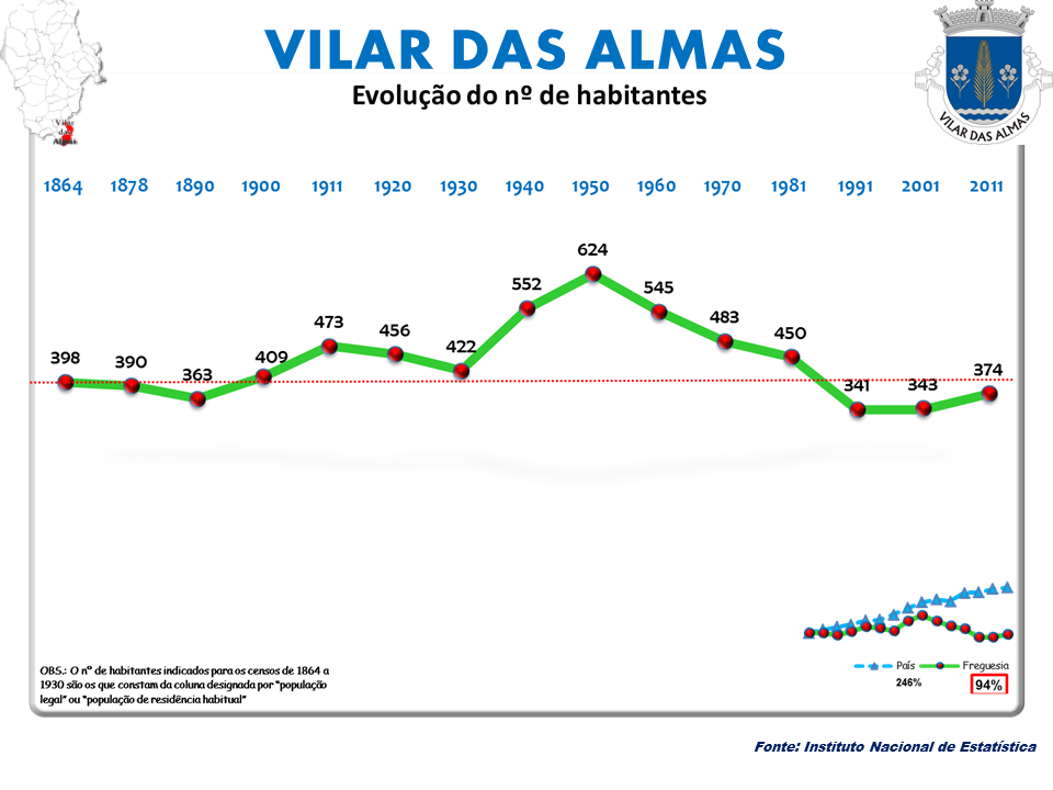 Censos 1864/2011